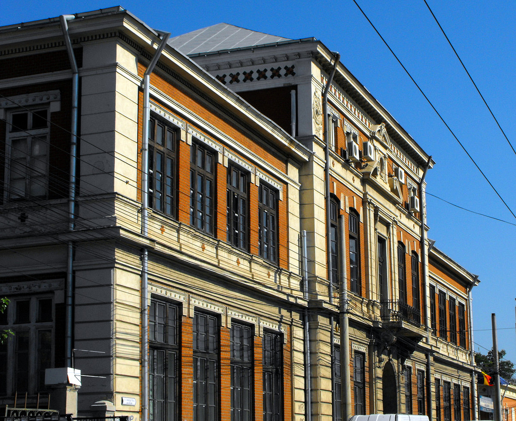 Institutul Politehnic - corpul L,fatada de la str Polizu